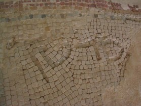 הכיתוב "סרטן" מאתר הפסיפס של בית הכנסת העתיק נערן. צולם בה' באייר ה'תשס"ו על ידי גידיל.